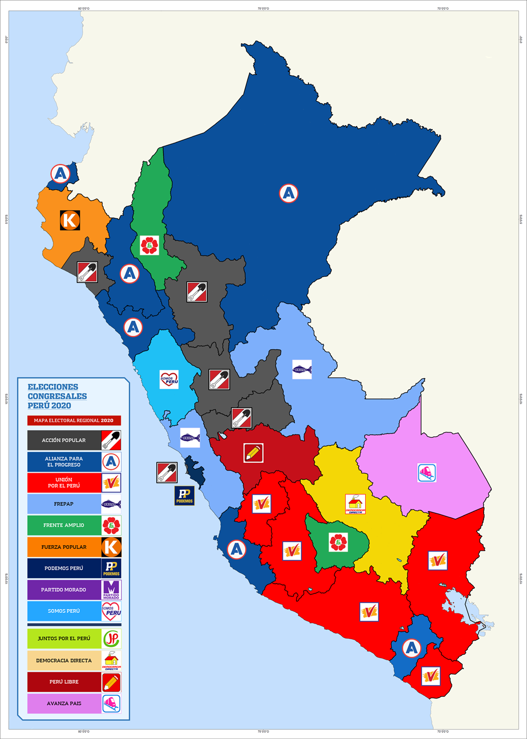 Mapa Electoral Perú 2020